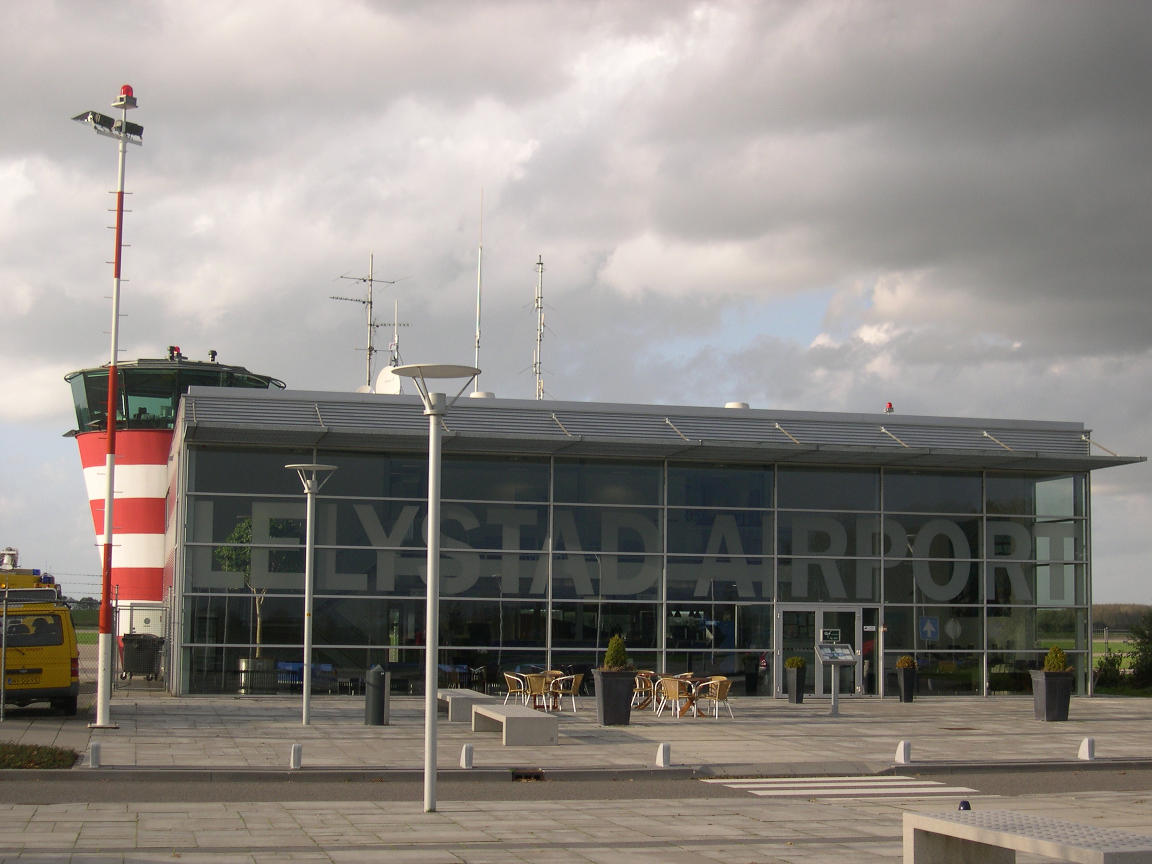 Hal en toren van vliegveld Lelystad.